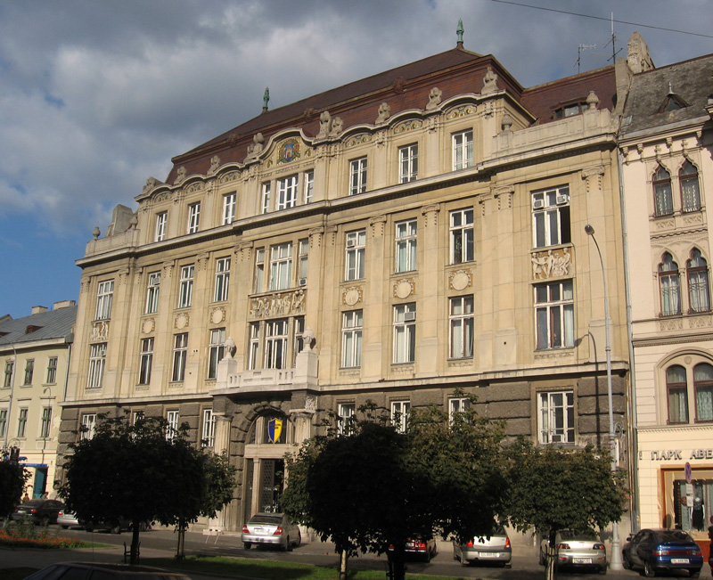 Проспект Шевченка, 17. Прокуратура